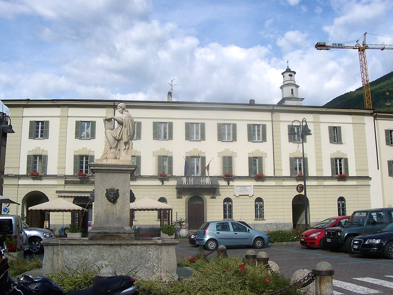 Tirano - Palazzo Marinoni (Municipio)